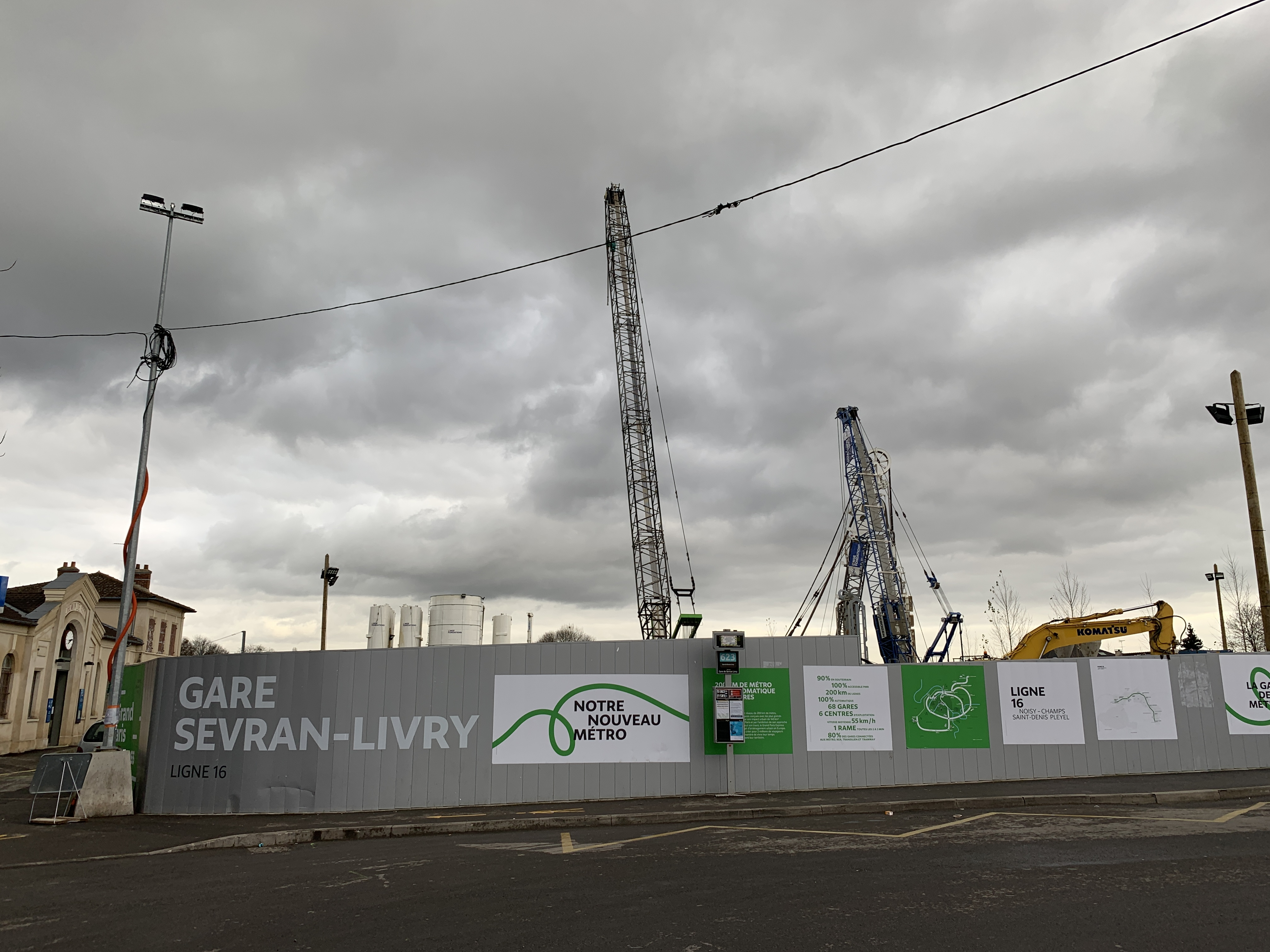 Chantier de la station de métro Sevran - Livry, Sevran.